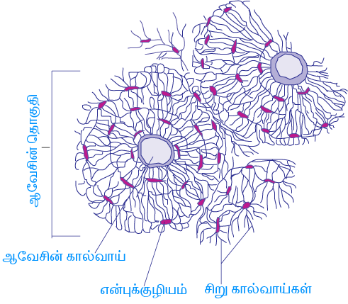 நெருக்கமான என்பொன்றின் ஆவேசின் தொகுதிகள்